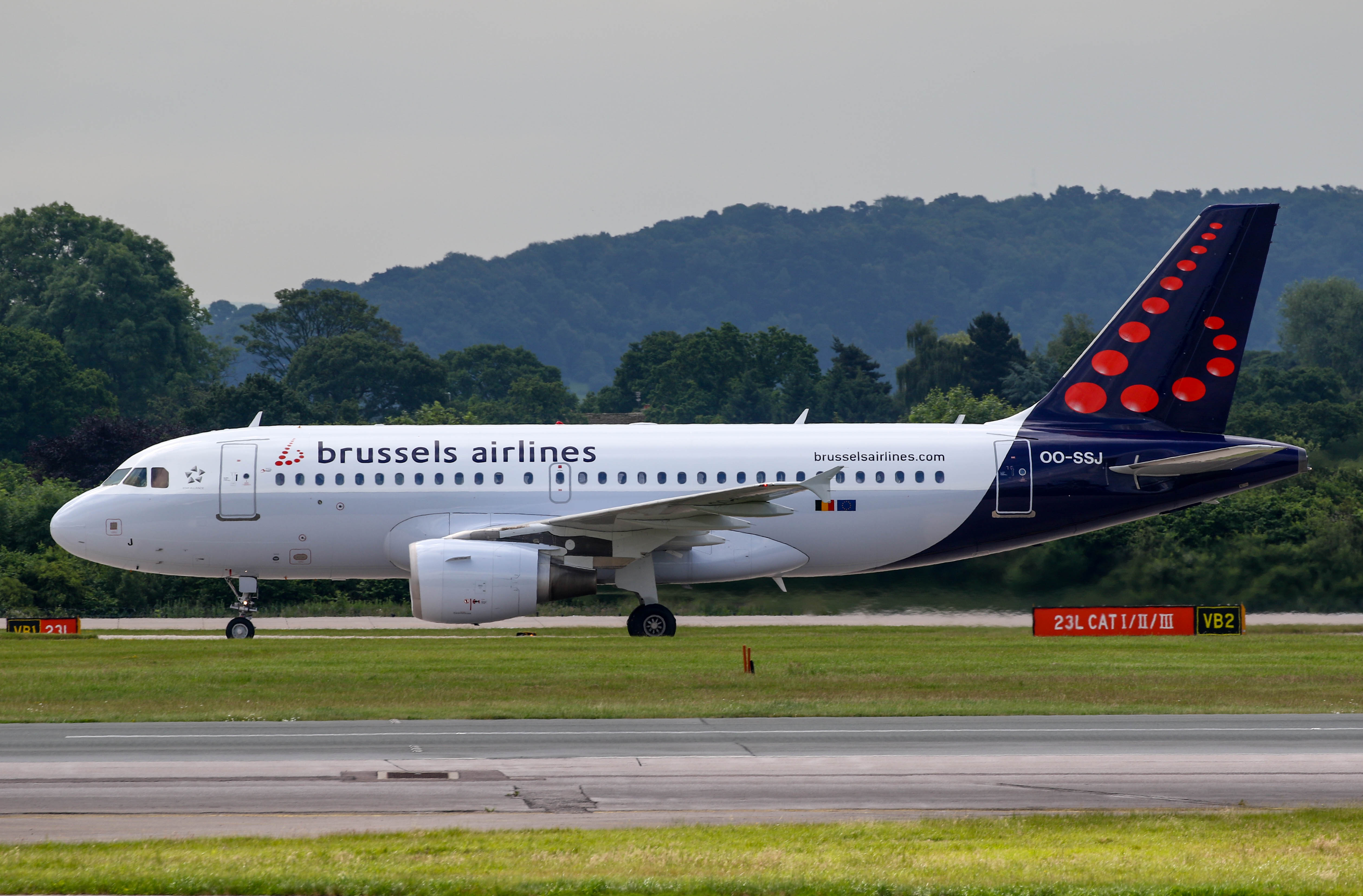 Brussels Airlines A320